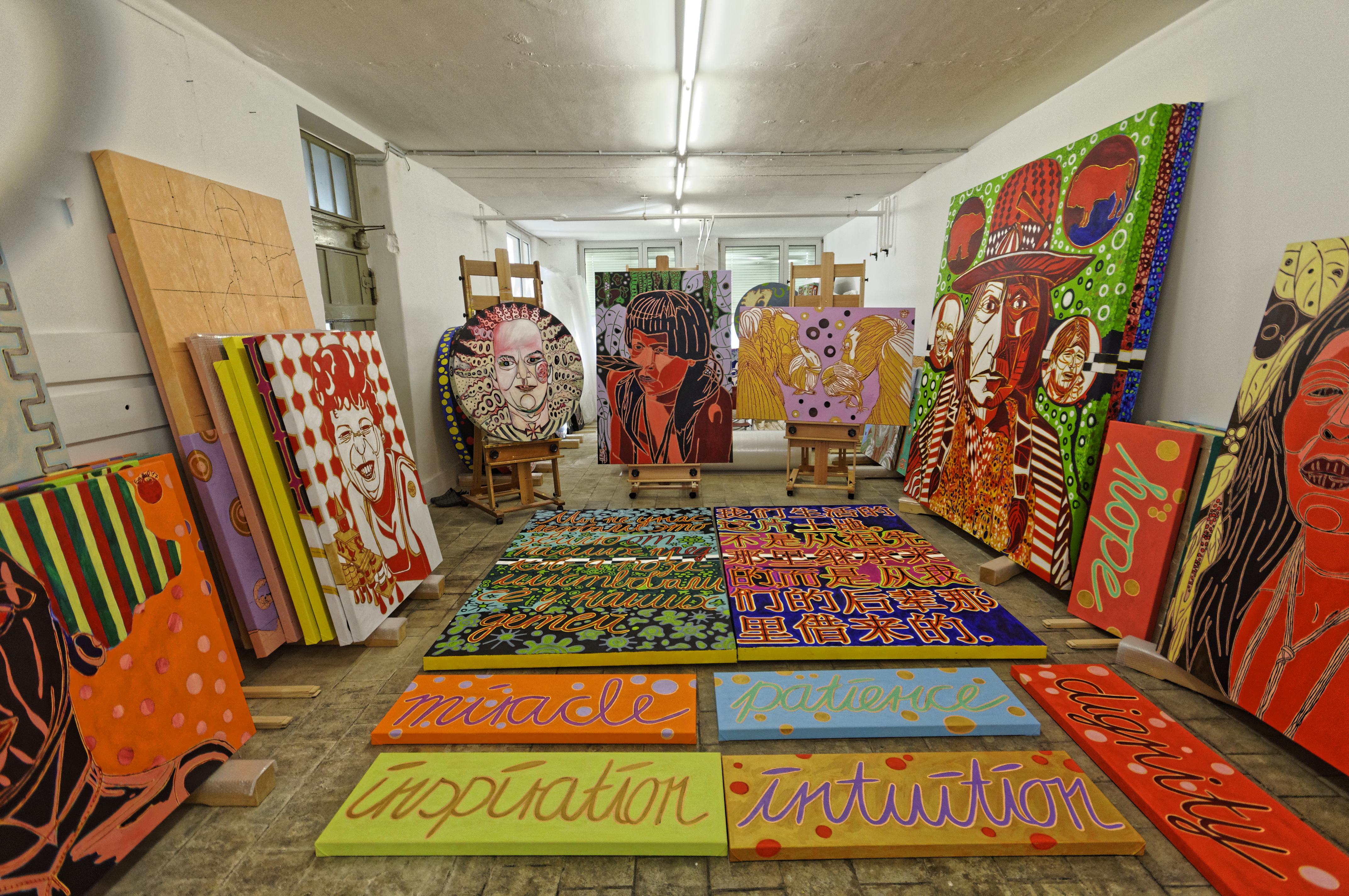 Bilder aus der Galerie von Eva Bur am Orde 2020 mit dem Schwerpunkt ornamentaler und figurativer Darstellungen.